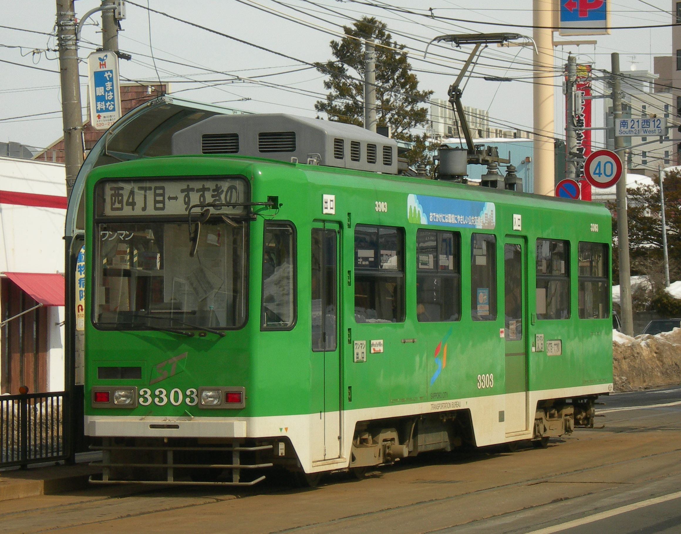 札幌市交通局3300形電車